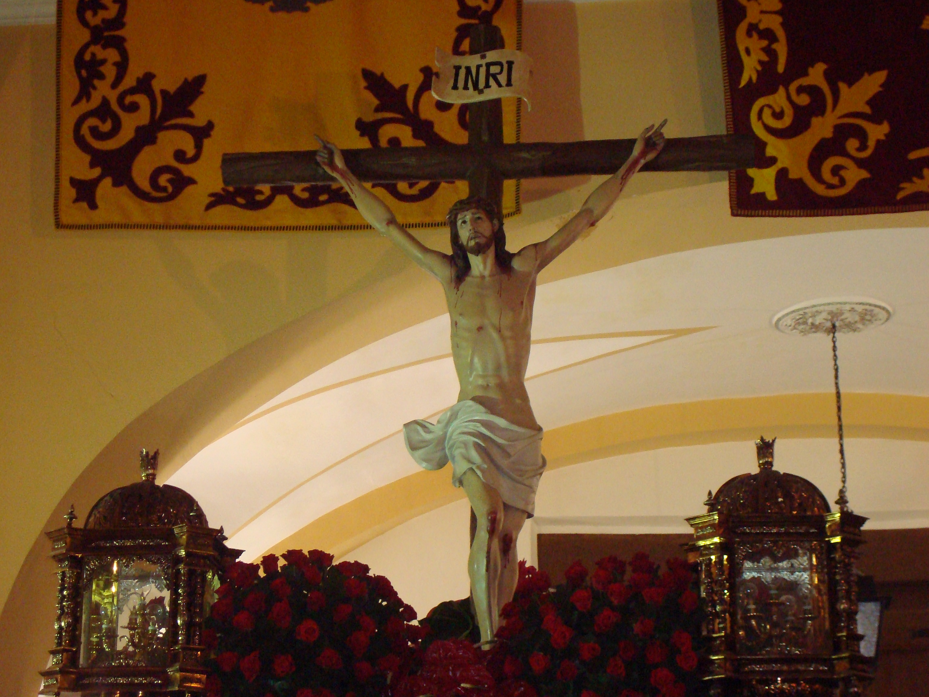 Imagen del Cristo de la Sangre, Paso Encarnado, Semana Santa, Lorca